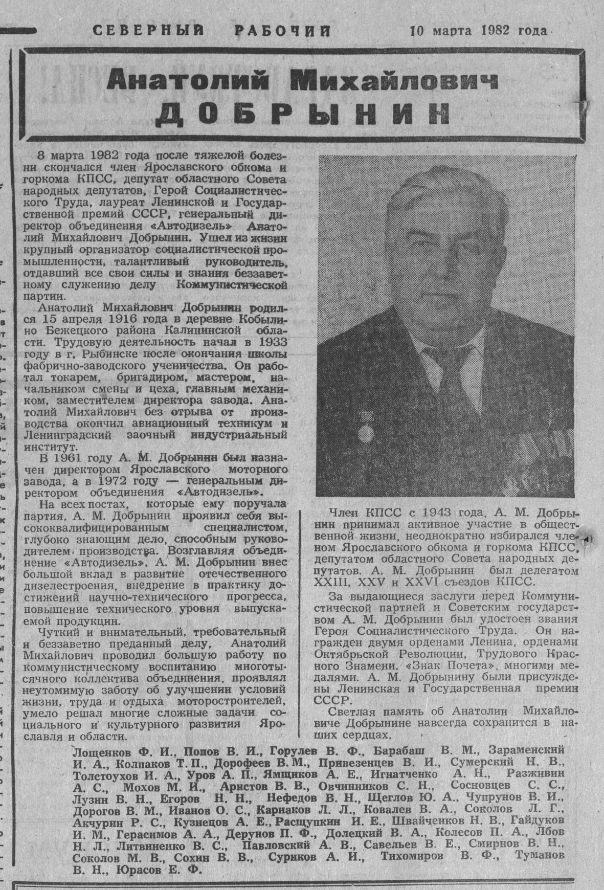 Некролог А.М. Добрынина, Северный рабочий 10 марта 1982 года.